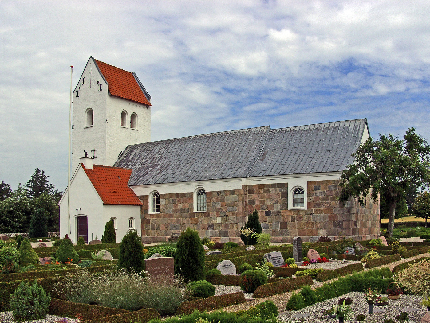 fra sydøst